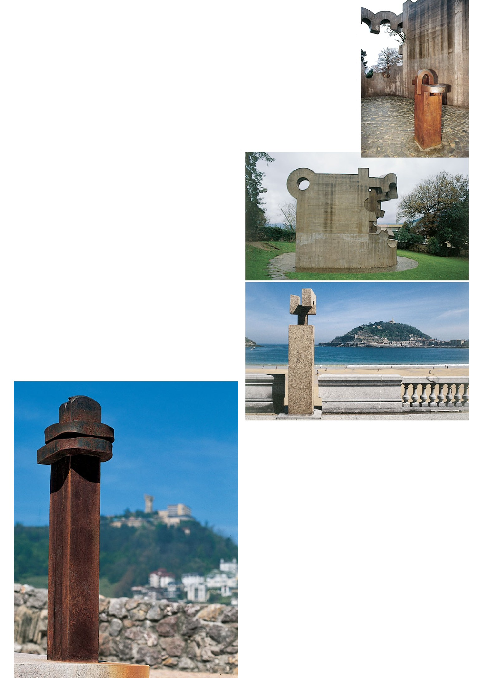 Eduardo Chillidaren zenbait lan. Eskuinean goian: “Gure aitaren etxea” obraren bi ikuspegi (1988), Gernikan (Bizkaia). Eskuinean behean: “Homenaje a Fleming”, 1985ean egina, Donostian 1991n jarria. Behean: “Para Rafael Ruiz Balerdi”, 1992koa, Donostian.